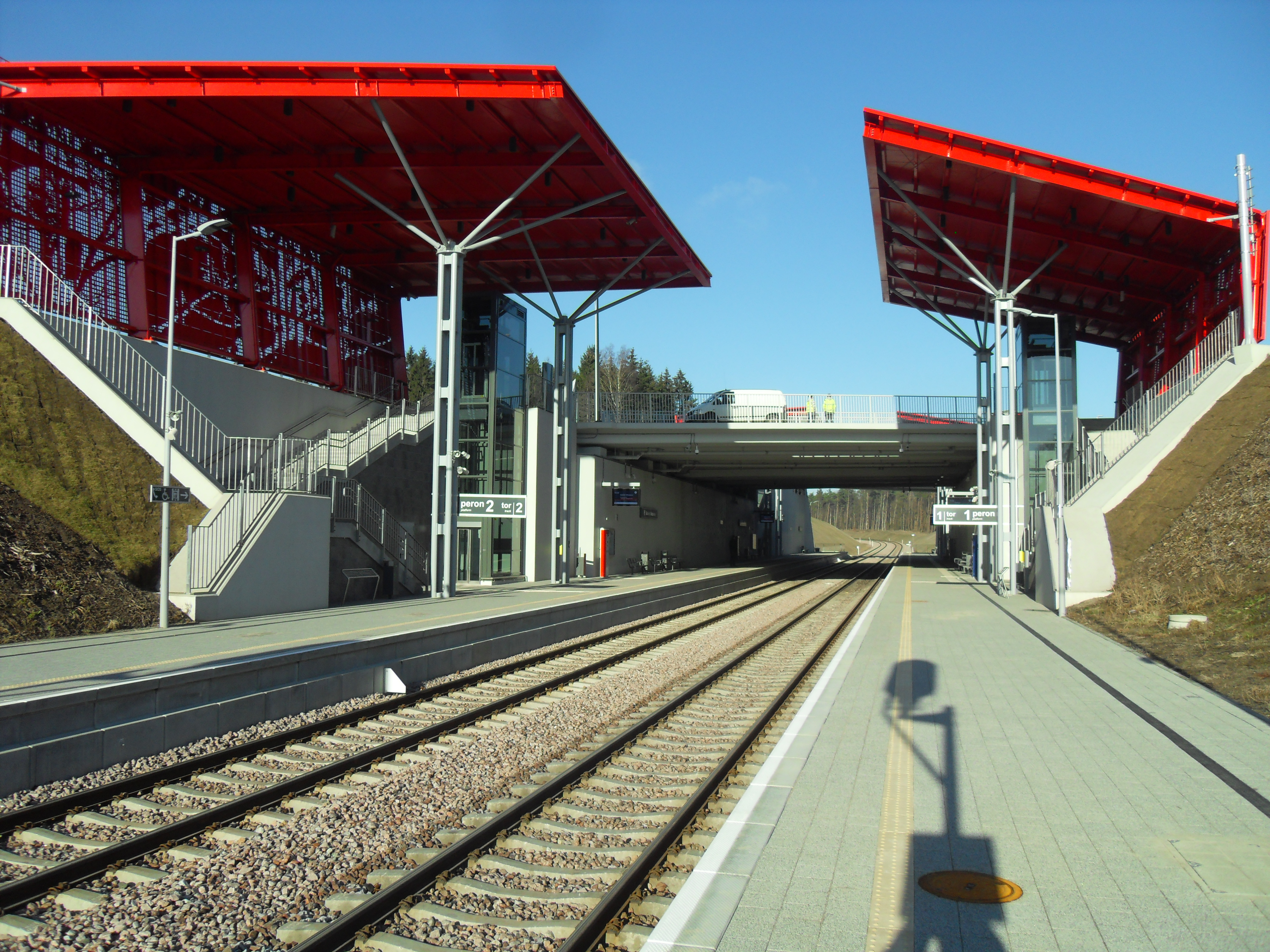 Przystanek Pomorskiej Kolei Metropolitalnej (PKM) Gdańsk Matarnia.